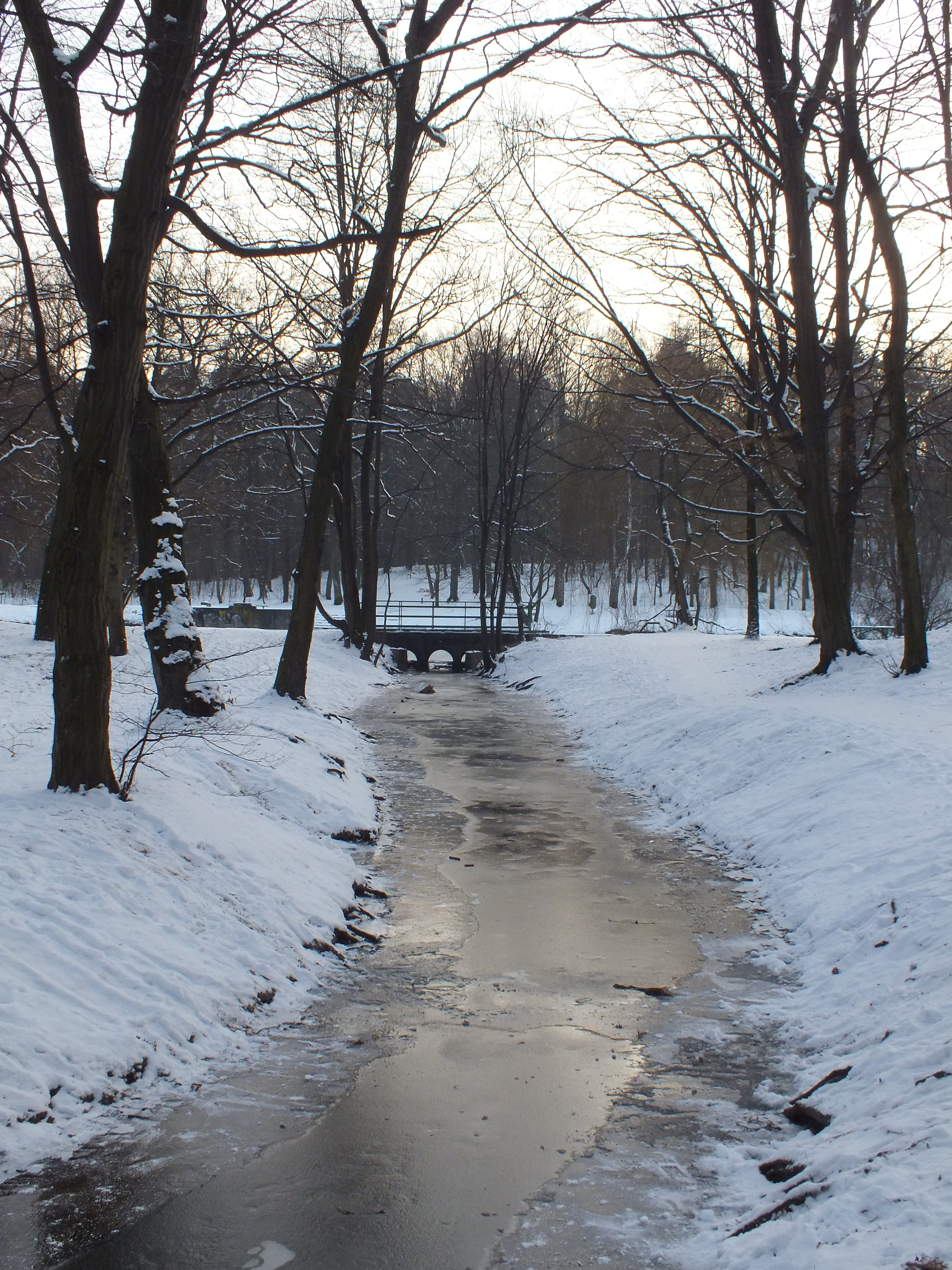 Park w Podkowie Leśnej ze strumieniem Niwka.